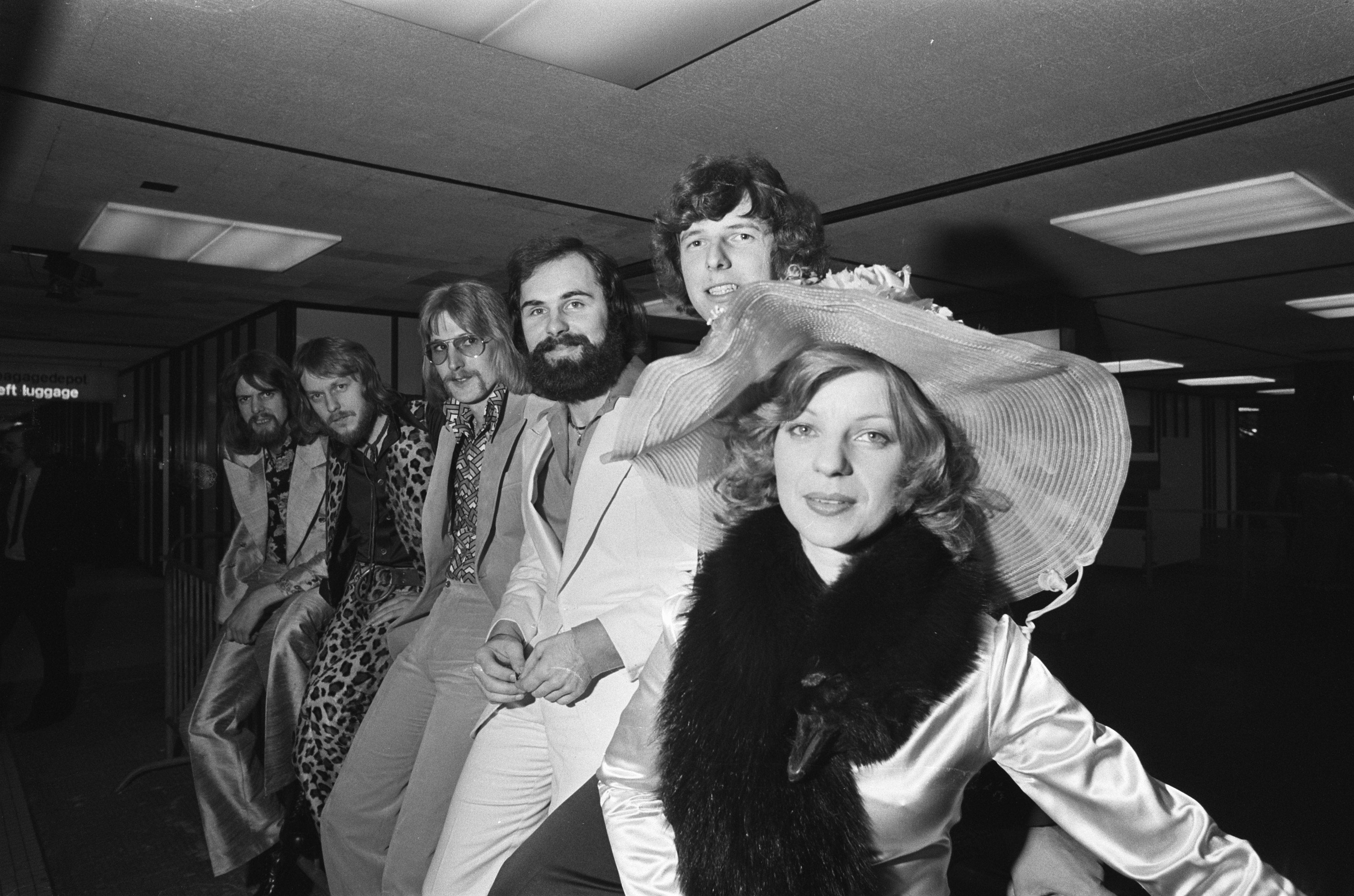 Collectie / Archief : Fotocollectie Anefo Reportage / Serie : [ onbekend ] Beschrijving : Popgroep Teach in van Schiphol naar Stockholm voor Eurovisie Songfestival Datum : 18 maart 1975 Trefwoorden : Popgroepen Persoonsnaam : Eurovisiesongfestival Instellingsnaam : Teach In Fotograaf : Mieremet, Rob / Anefo Auteursrechthebbende : Nationaal Archief Materiaalsoort : Negatief (zwart/wit) Nummer archiefinventaris : bekijk toegang 2.24.01.05 Bestanddeelnummer : 927-8106